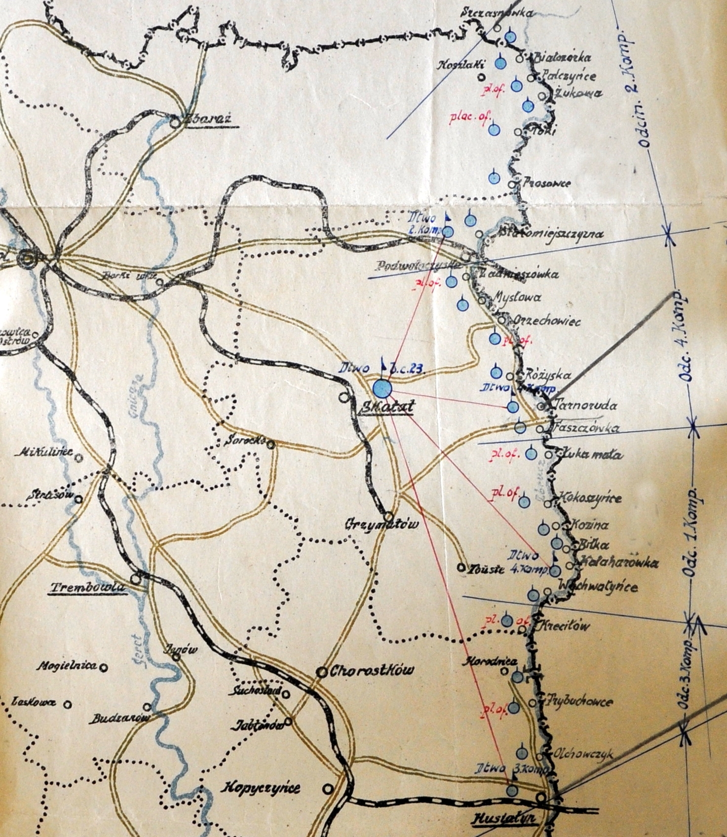 Szkic rozmieszczenia 23 batalionu celnego